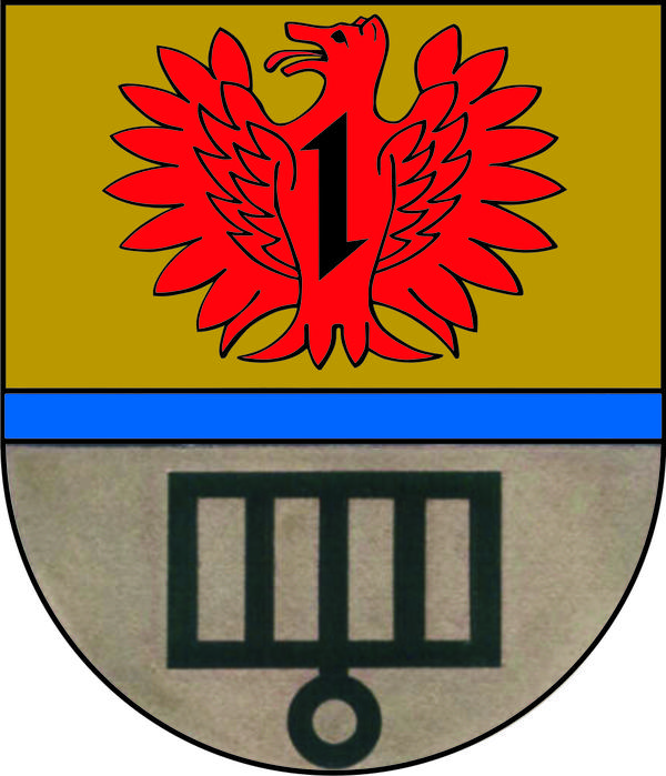 Wappen von Krummenau (Hunsrück)